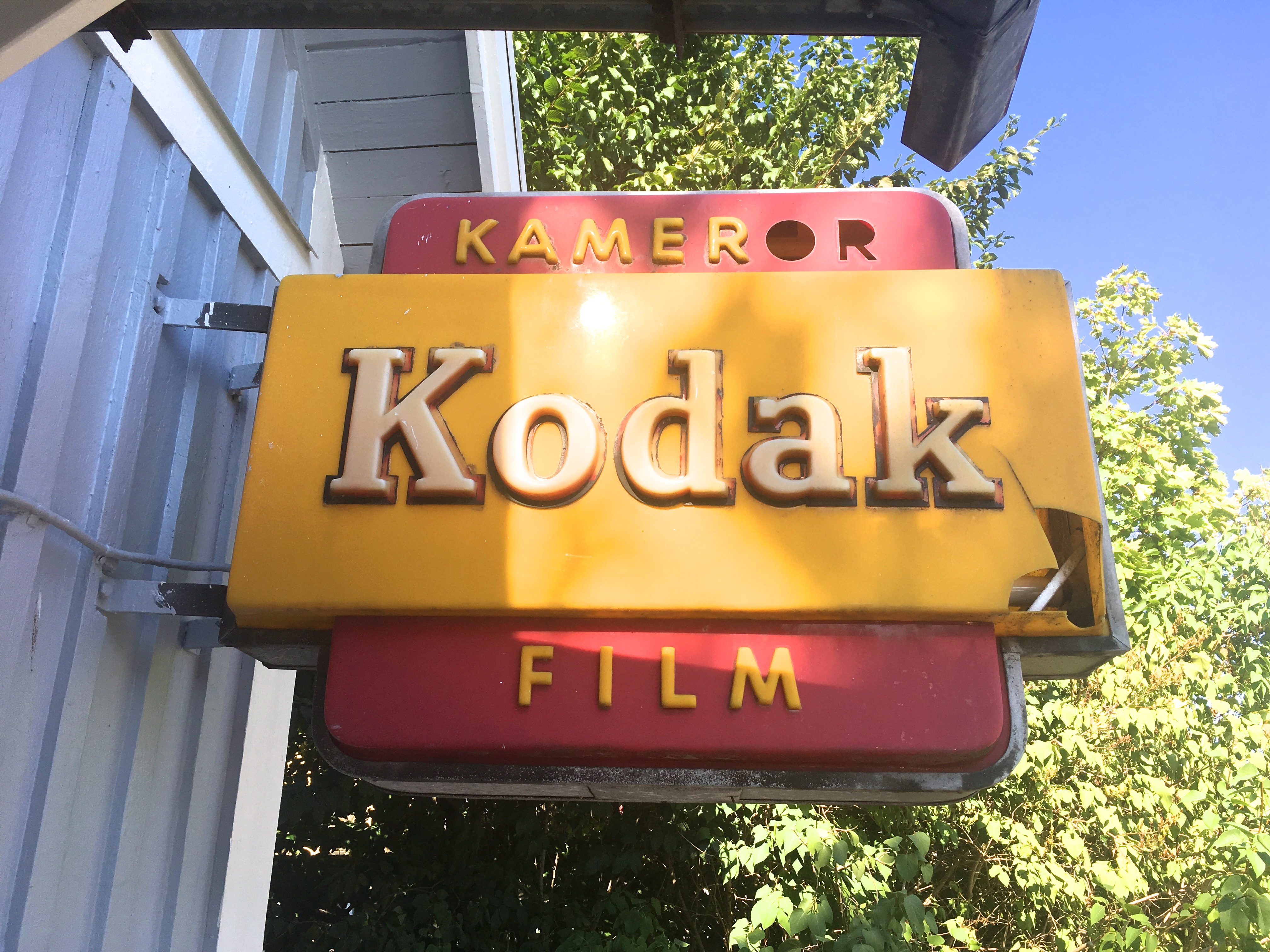 Kodak - kameror - film, Ekholms fotoateljé i Kallinge, Ronneby kommun. Ateljén är byggnadsminne sedan 4 november 2015. Den är belägen på Norra Smålandsgatan 6 i Kallinge och är en av Sveriges minsta och äldsta dagsljusateljéer för fotografering.